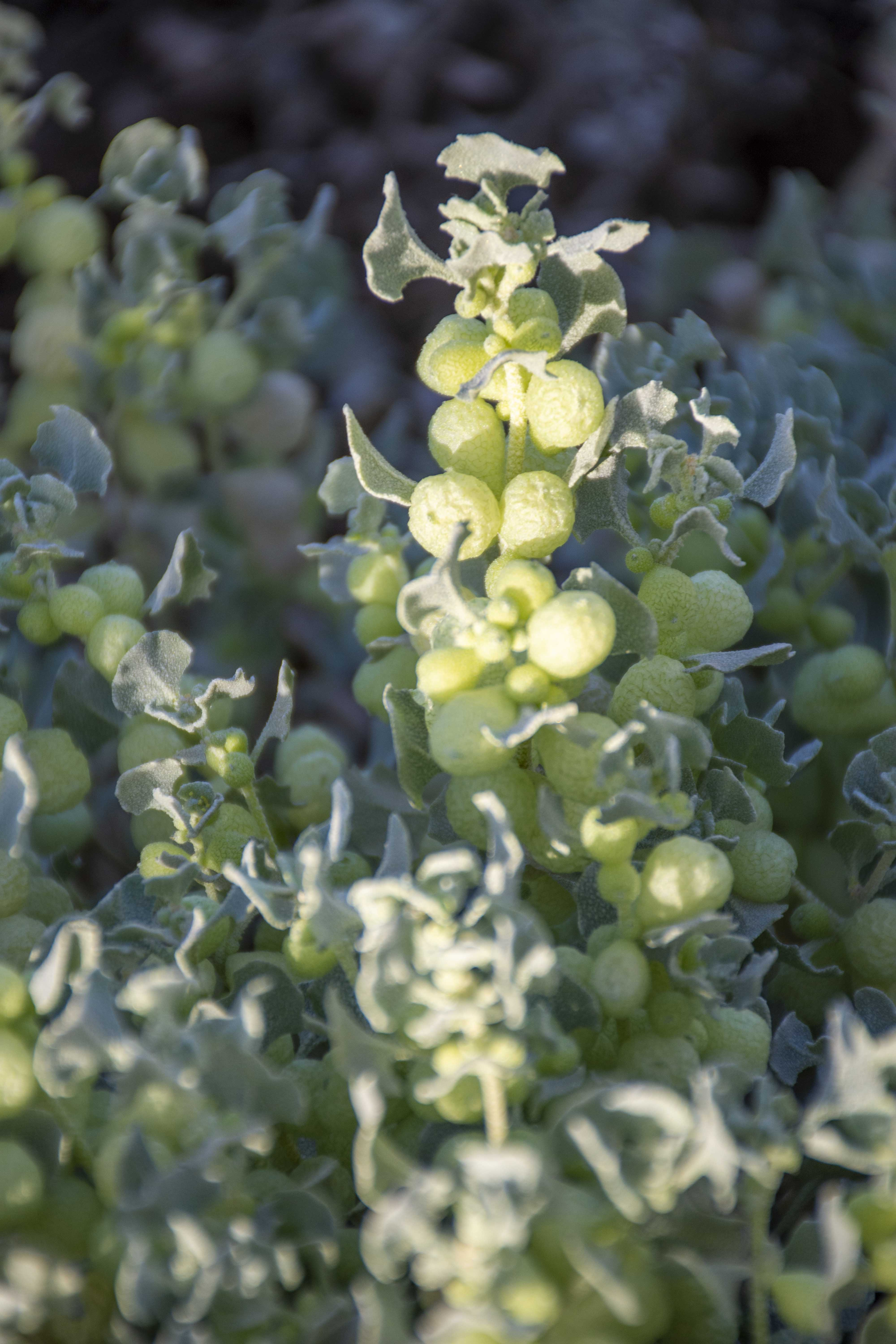 מלוח קיפח ותפרחת